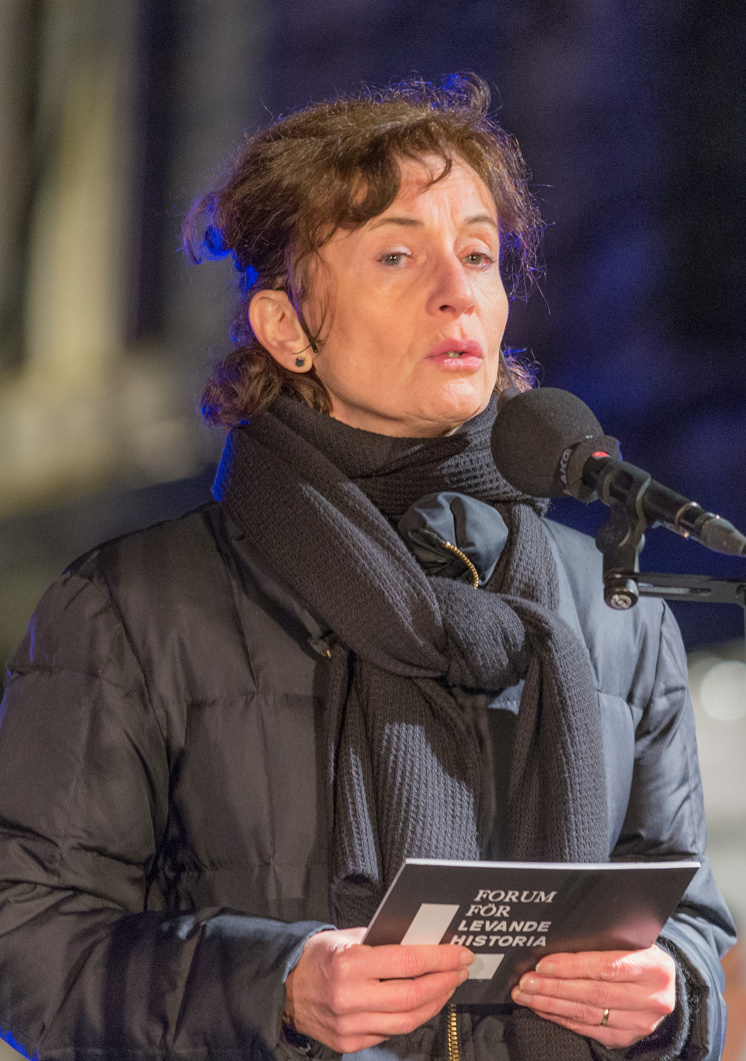 Ingrid Lomfors on Holocaust Remembrance Day, January 27, 2016.